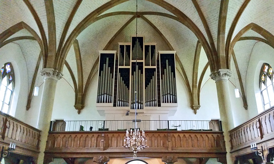 Orgel der Brackweder Firma Detlef Kleuker in der Evangelischen Kirche Isselhorst